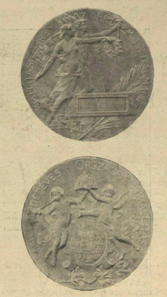 1896 millennium kiállítási érme